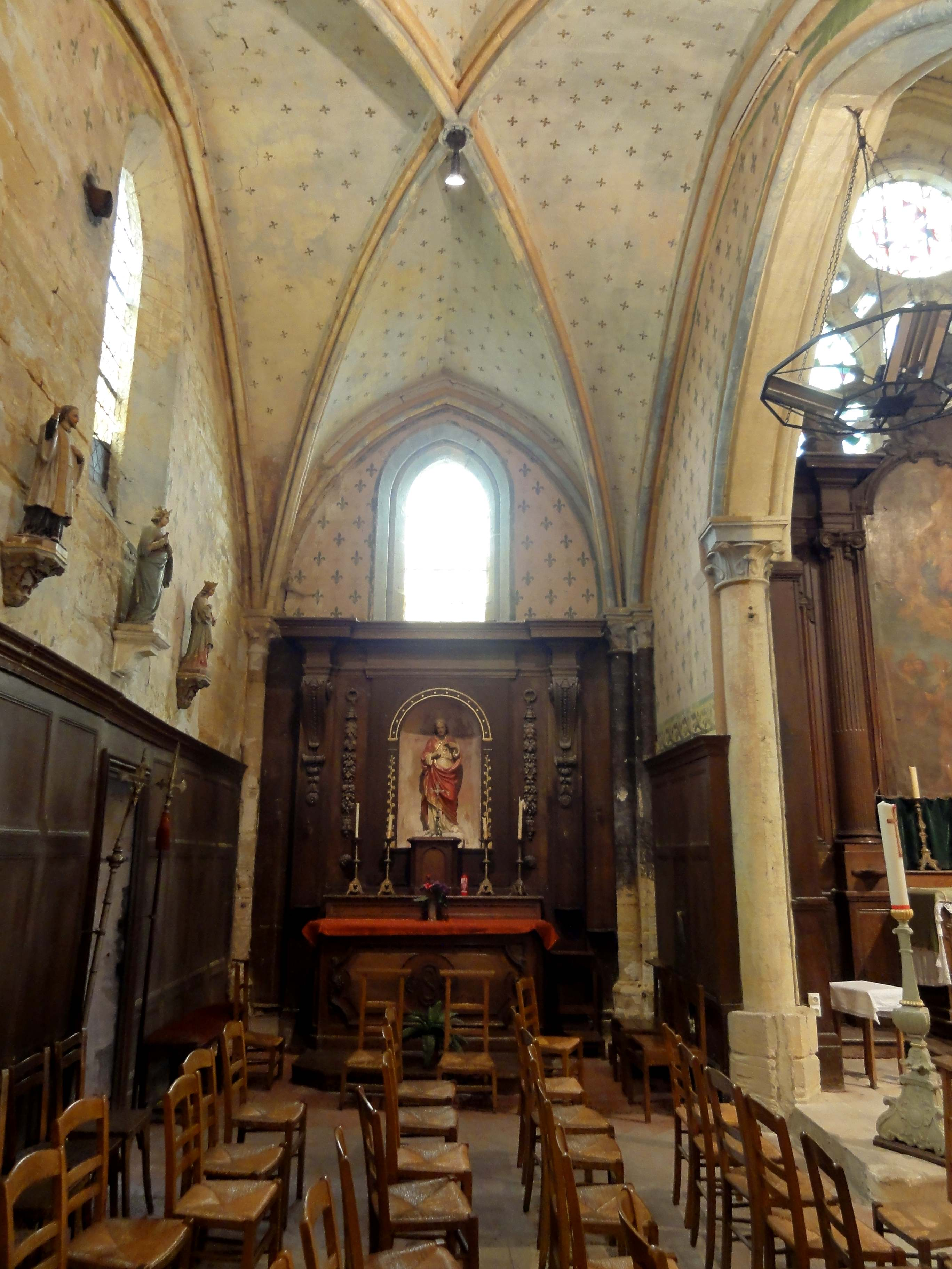 Intérieur de l'église (voir titre).